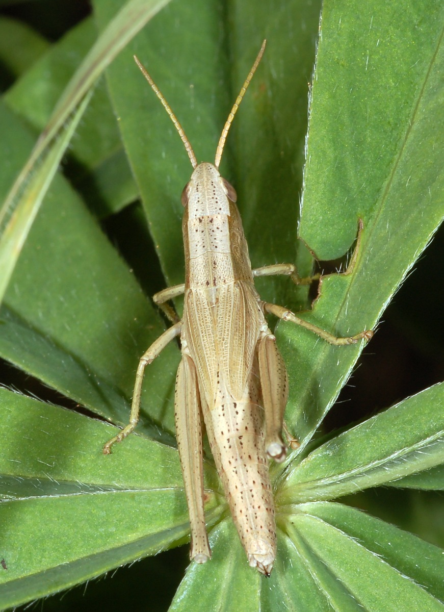 Chrysochraon dispar, Idstein, Hessen, Deutschland